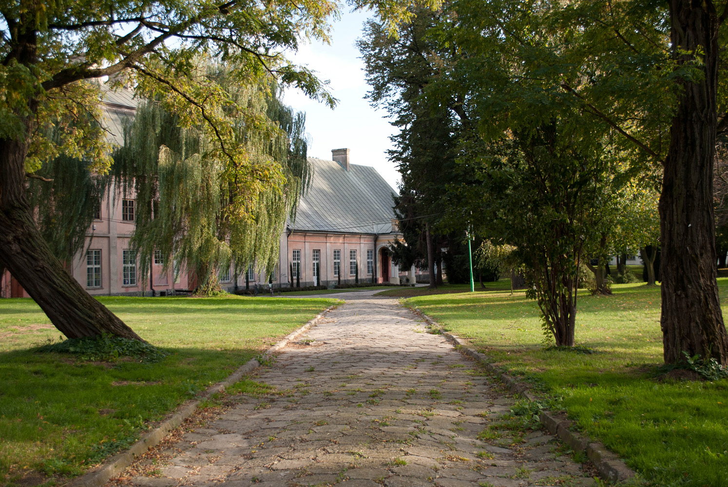 Zespół pałacowy park Boguchwała, Boguchwała 05.1968.